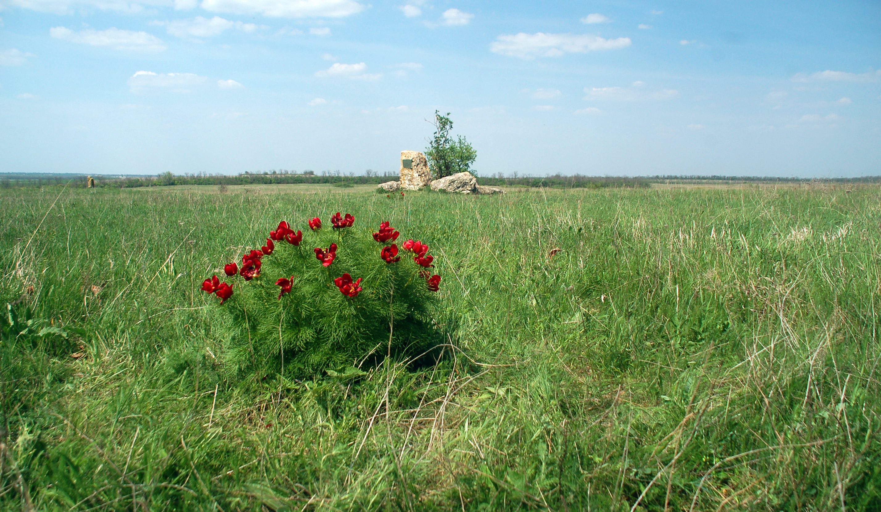 Хомутовская степь. Место съемки С.Бондарчуком фильма "Степь"